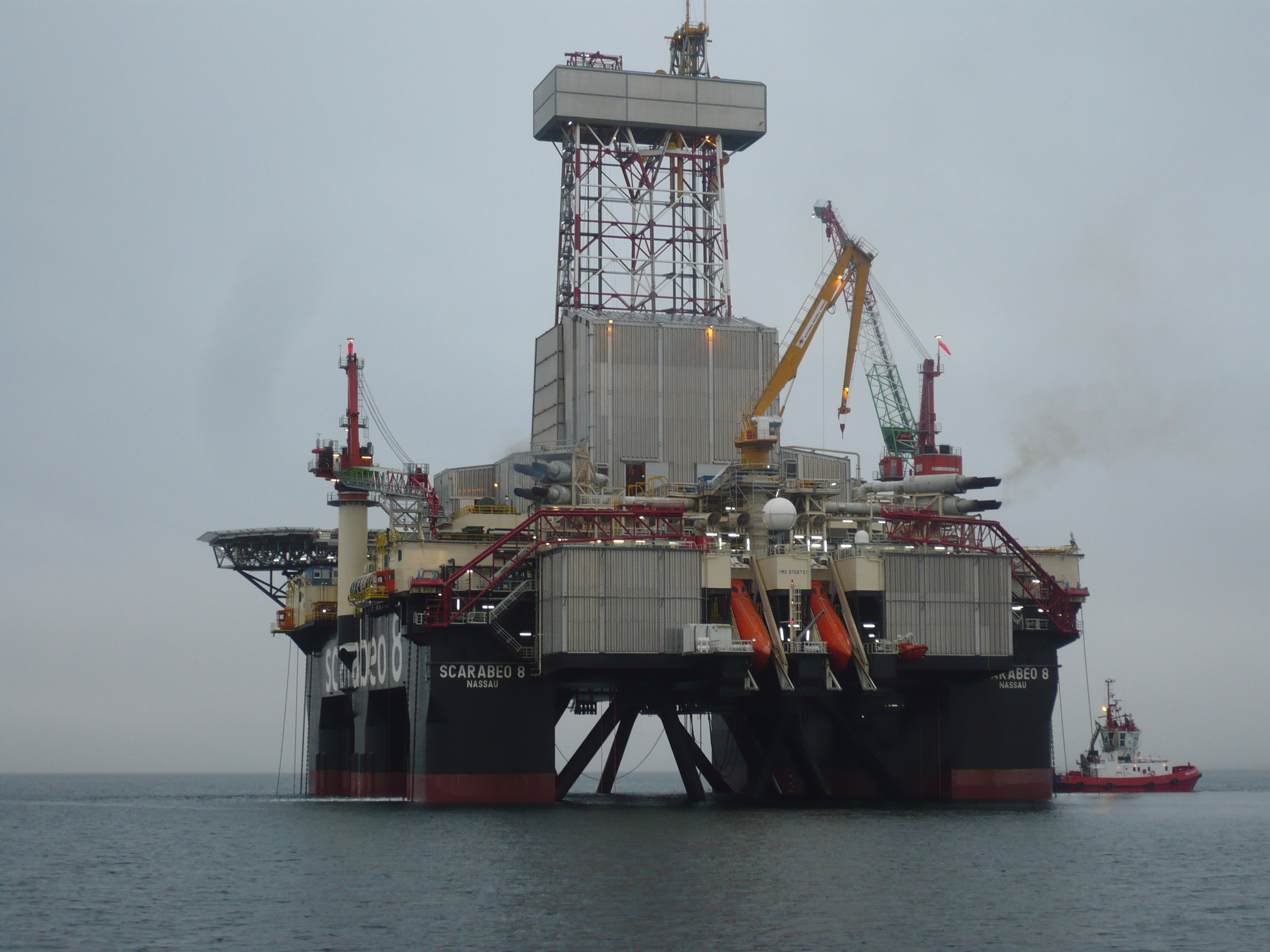 Scarabeo 8 i Klosterfjorden